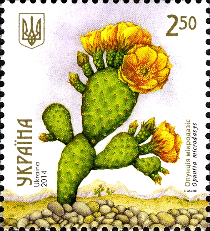 Марка України «Опунція мікродазіс Opuntia microdasys»